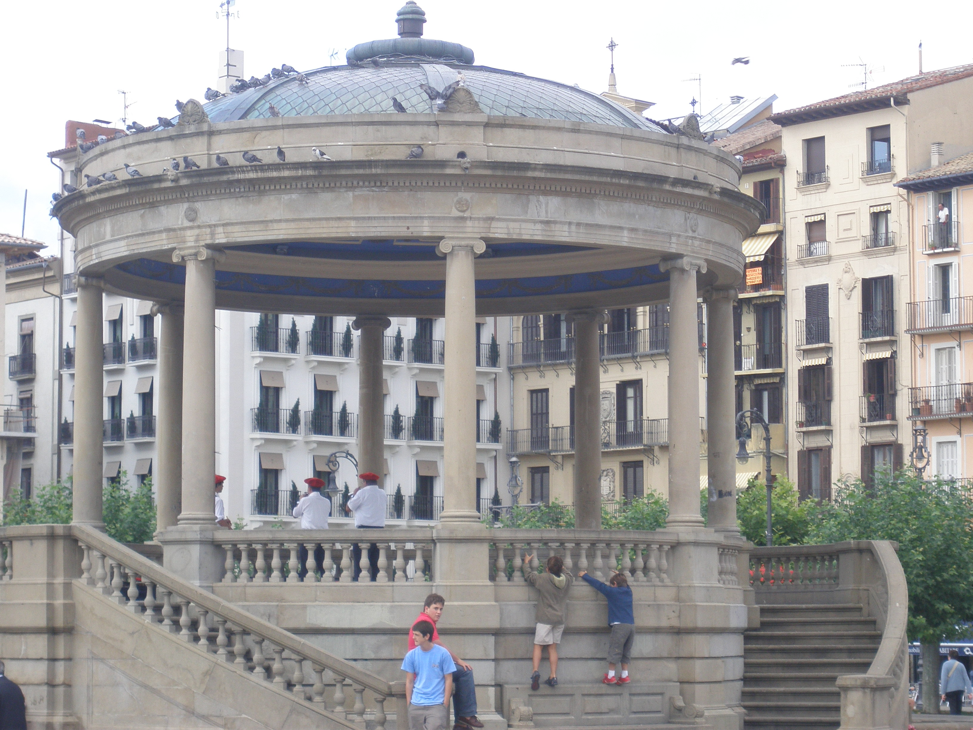 Template:Es1Quiosco en la Plaza del Castillo.